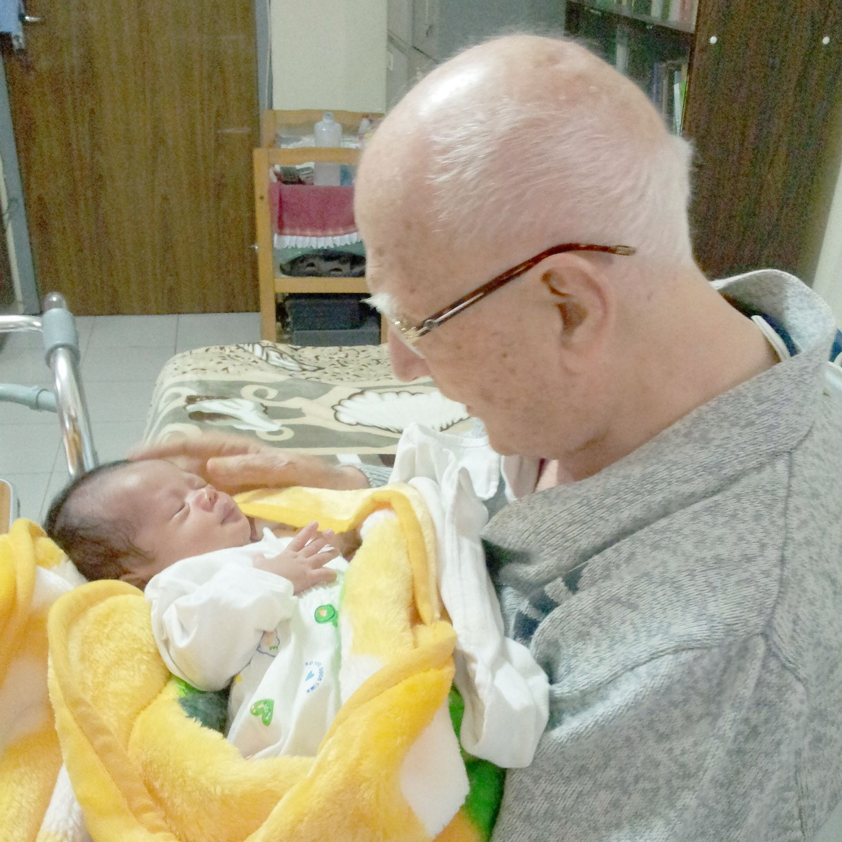 Dengan Bayi